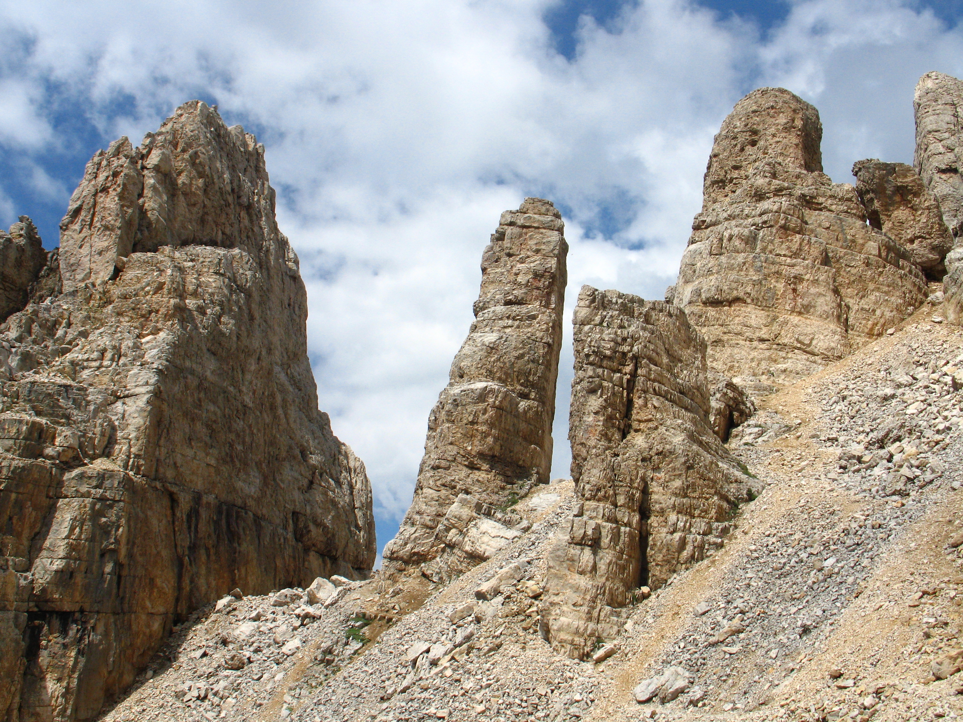 Torre di Pisa - (Gruppo del Latemar - Dolomiti) vista dai pressi del Rifugio Torre di Pisa